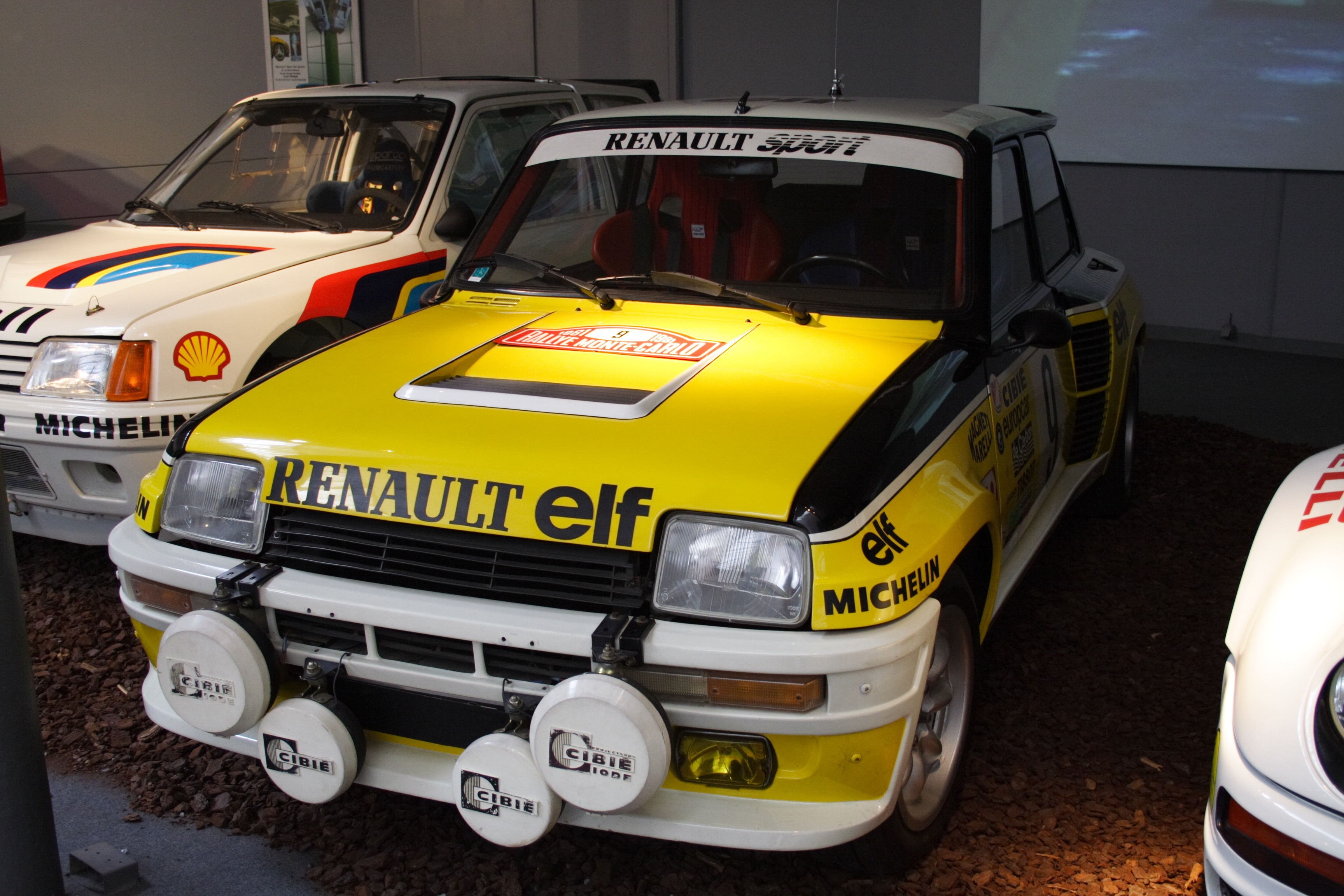 Renault 5 at the Musée National de l'Automobil(Mulhouse, France)